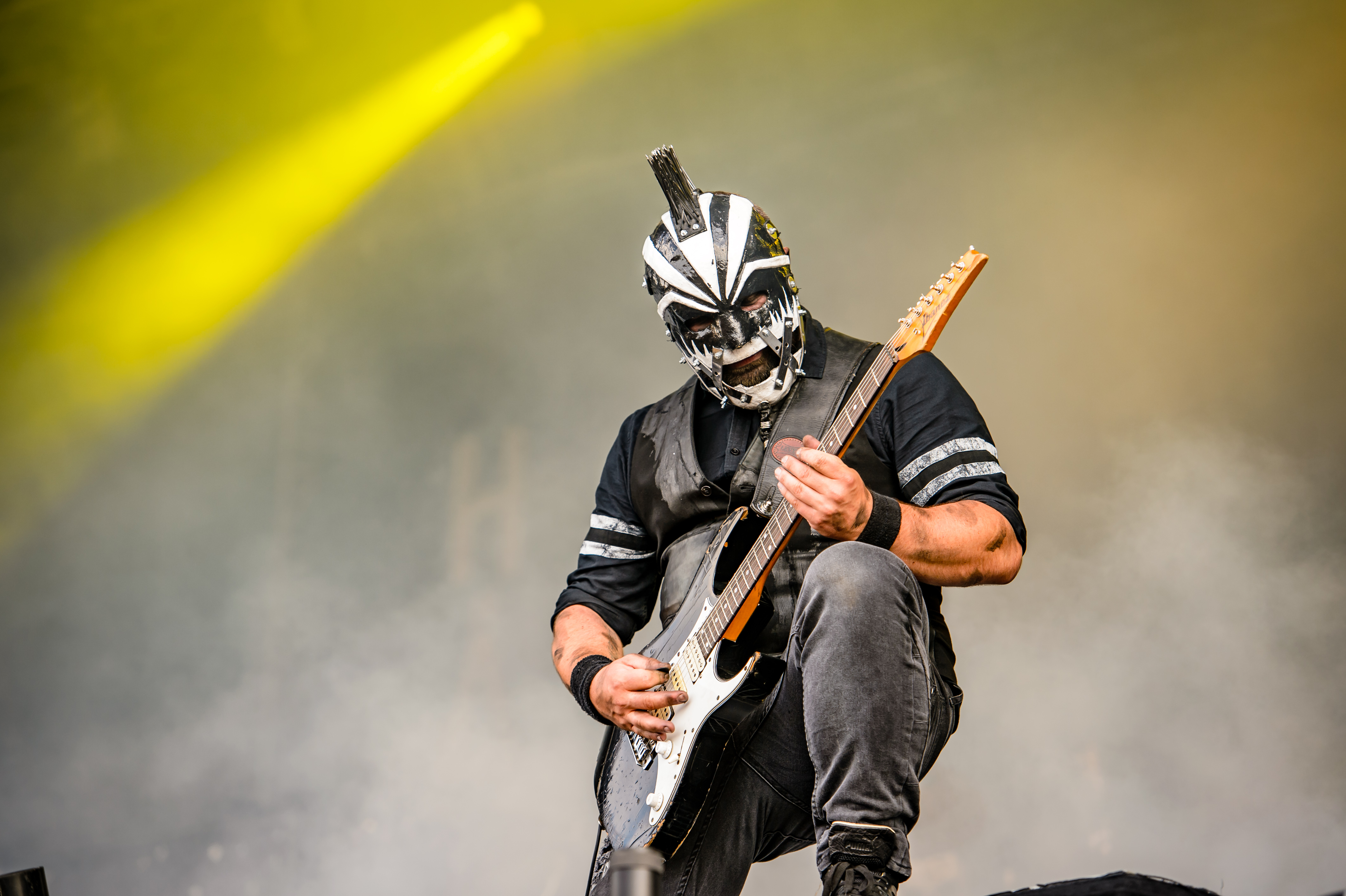 'RockHarz Open Air 2016; Ballenstedt': 'Hämatom'